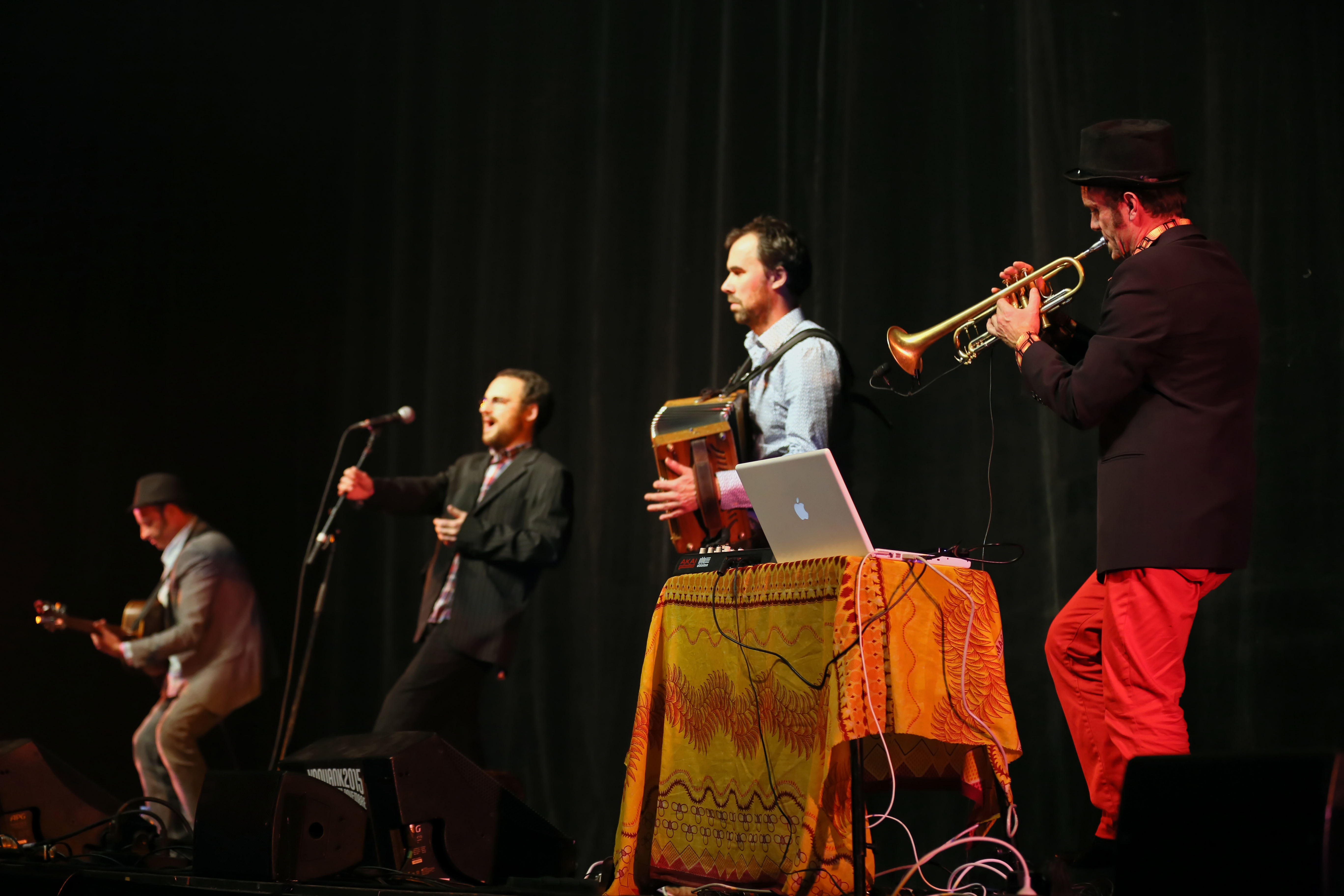 Alambig Electrik & l’Usine à Canards en fest-noz lors du festival Yaouank le 21 novembre 2015 au Parc des Expositions de Rennes.